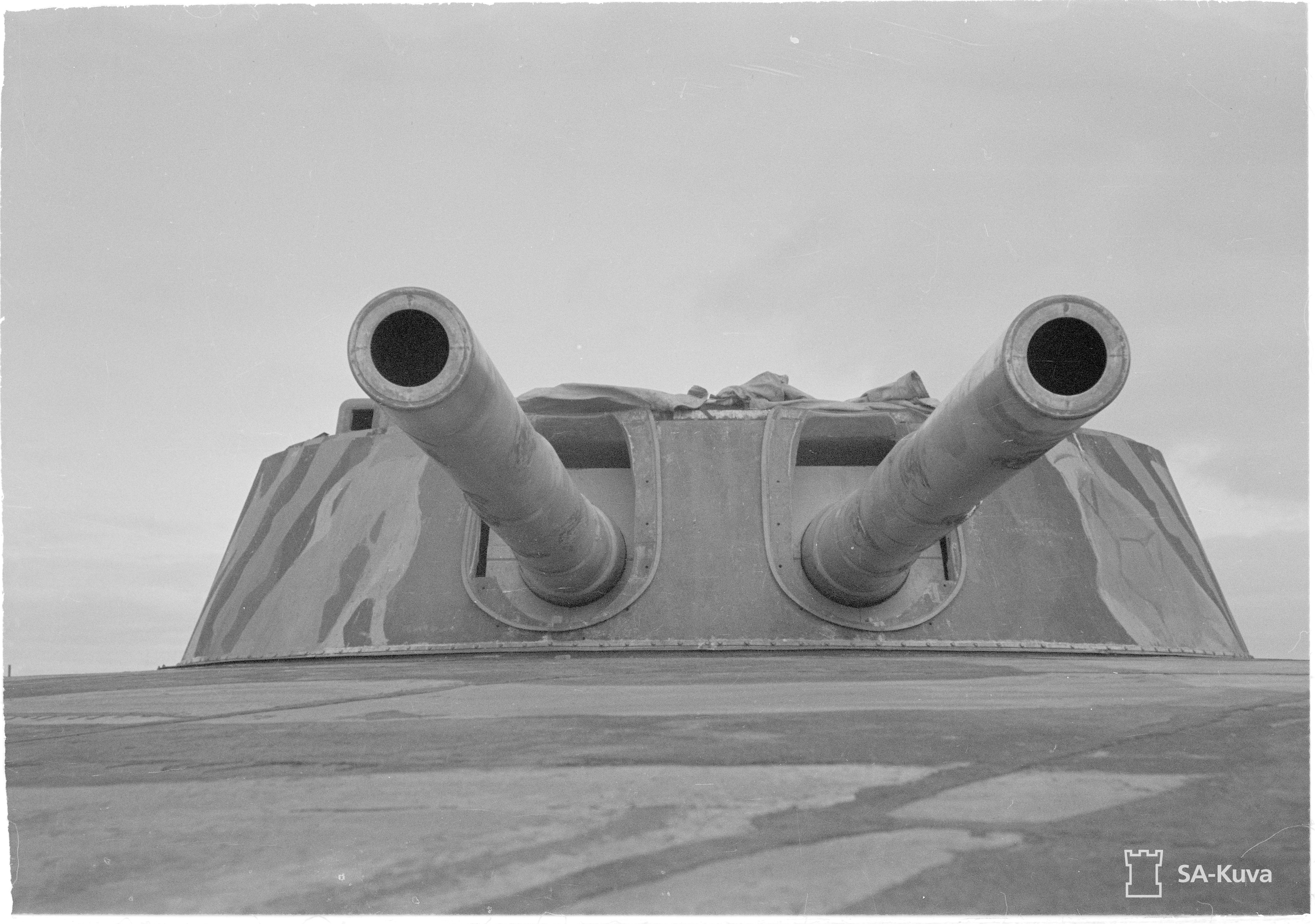 12 tuumainen. (Kuvan tykki on 305 mm:n 52 kaliiperin venäläinen merikanuuna mallia Obuhov panssaroidussa tornissa kaksoisasennettuna, suomalainen mallinimi 305/52 O2). Kuvauspaikka: Mäkiluodon linnake.